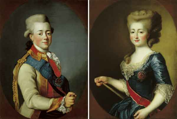 Портрет великого князя Павла Петровича. Портрет великой княгини Марии Федоровны. ГМЗ «Павловск»